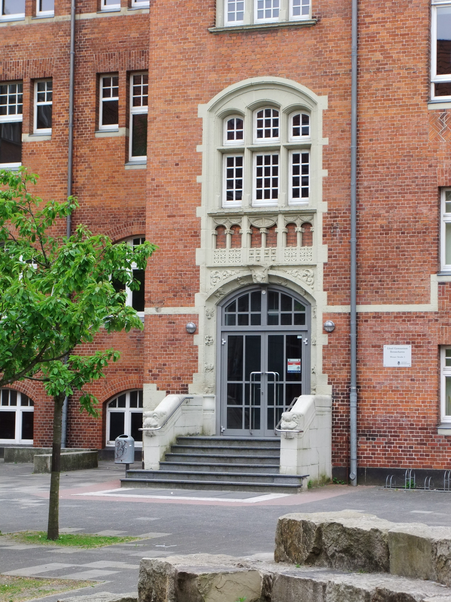 Pestalozzischule in Bremerhaven, Wiener Straße 3.Das abgebildete Objekt ist ein geschütztes Kulturdenkmal in der Freien Hansestadt Bremen, mit der Nr. 3186 beim Landesamt für Denkmalpflege registriert.